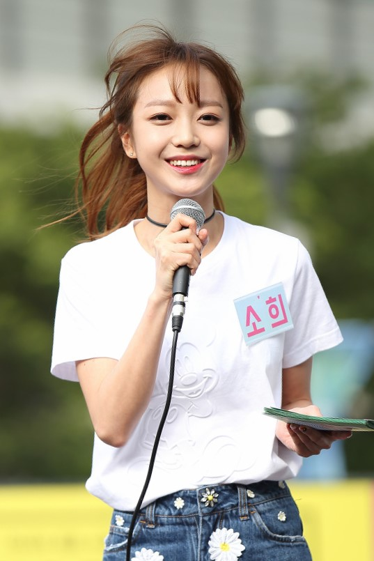 건대 스타시티 송유빈 버스킹공연 MC